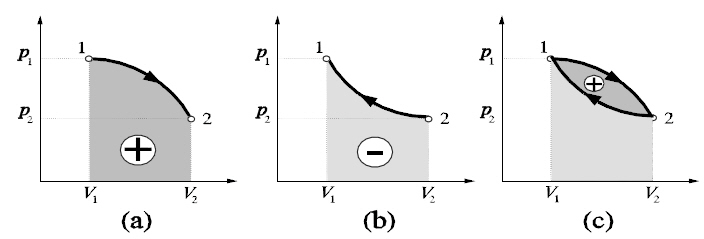 El trabajo en los diagramas de Clayperon